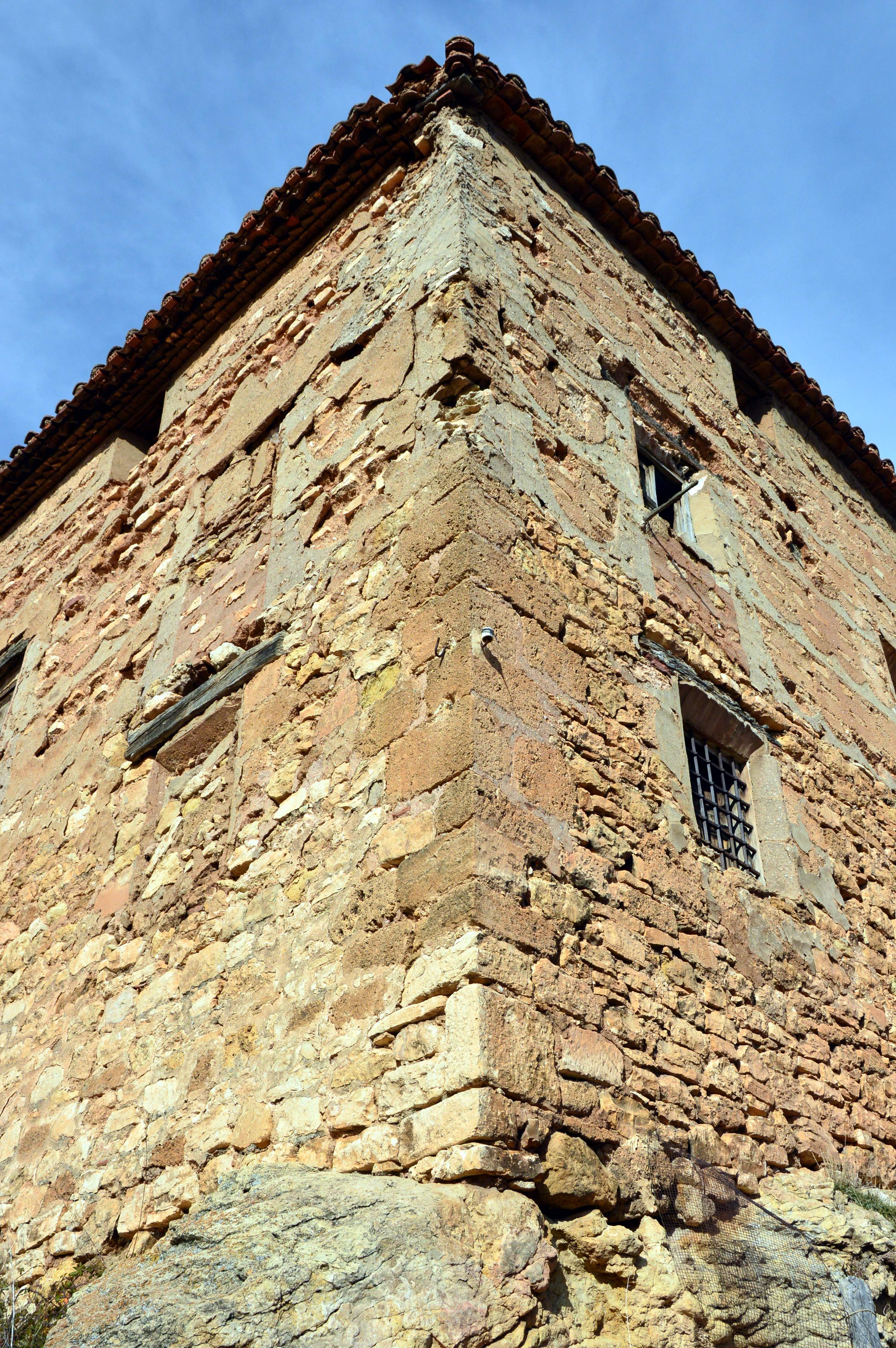 Detalle de la esquina suroriental de la Casa Abadía (Casa del Cura) de Castielfabib (Valencia), perteneciente al recinto amurallado (2019).